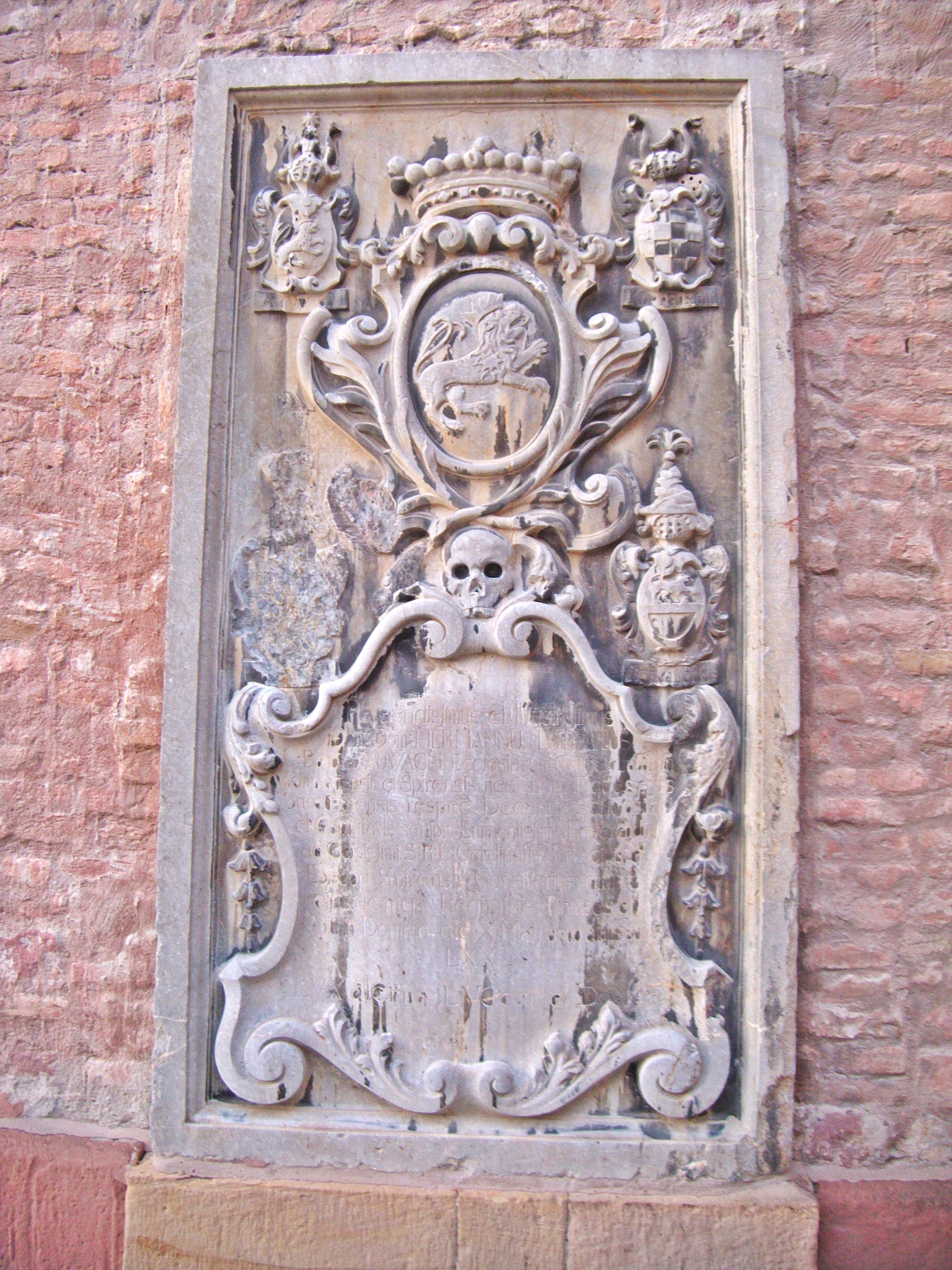 Der Epitaph des Domherren Hermann Lothar von Auwach (+ 1722), südliche Außenseite des Speyerer Domes